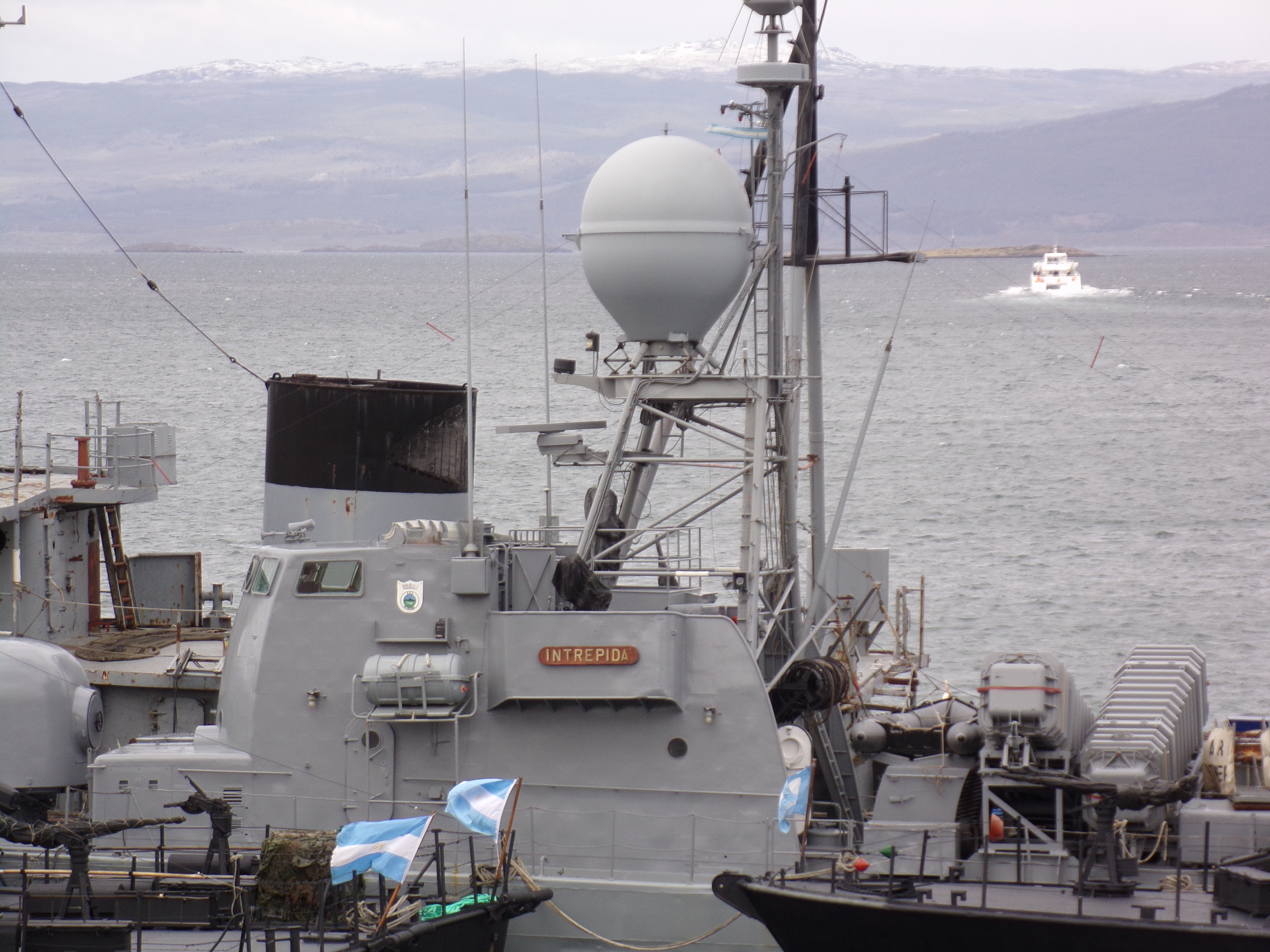 Base Naval Ushuaia